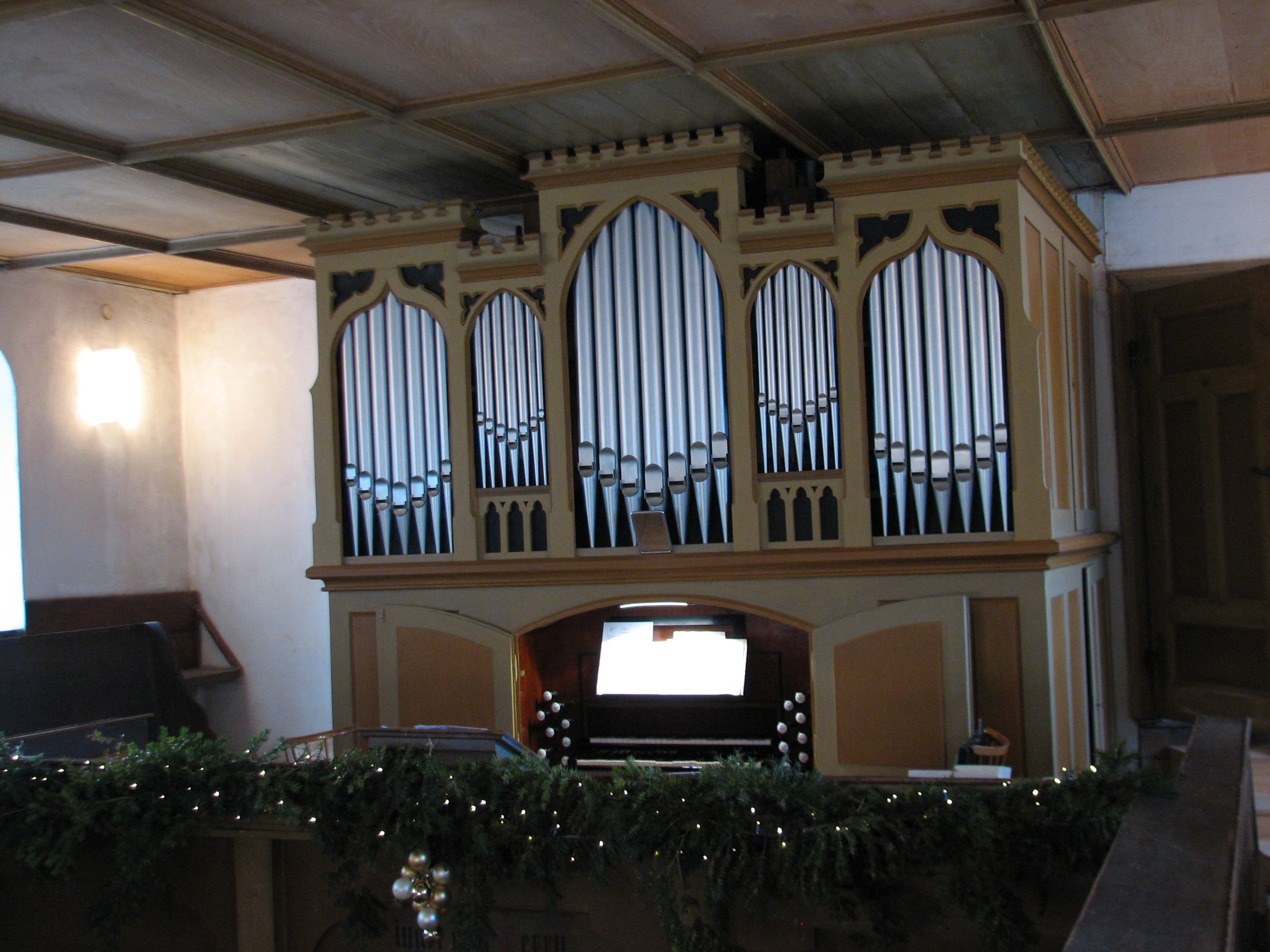 Geißler-Orgel auf der Empore